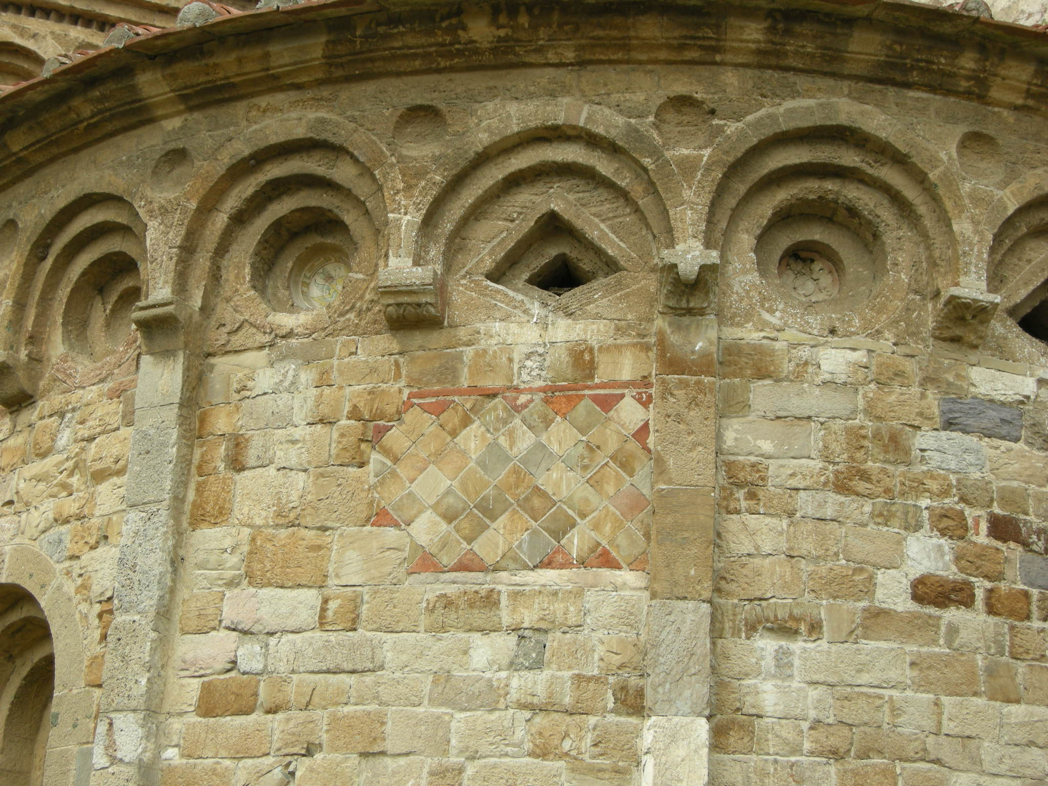 Basilica di san piero a grado, esterno